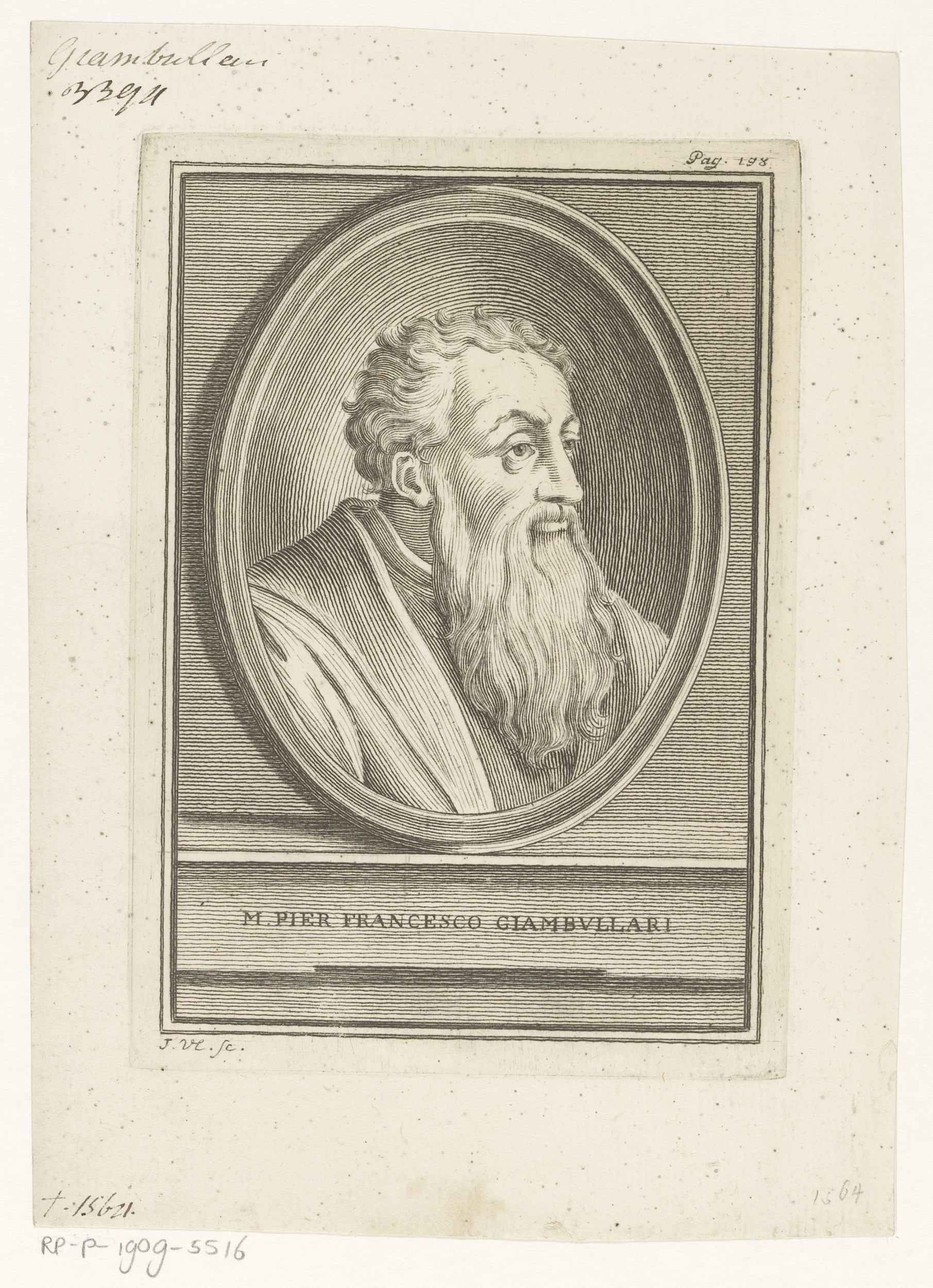 IdentificatieTitel(s): Portret van liedschrijver Pier Francesco GiambullariPortretten van schrijvers die liederen schreven voor Lorenzo de'Medici (serietitel)Objecttype: prent boekillustratie Objectnummer: RP-P-1909-5516Opschriften / Merken: verzamelaarsmerk, verso, gestempeld: Lugt 2228opschrift, recto boven, handgeschreven in bruine inkt: ‘Giambullari / 3394’Omschrijving: Genummerd rechtsboven: Pag. 198.VervaardigingVervaardiger: prentmaker: J. Verkruys (vermeld op object)uitgever: CosmopoliPlaats vervaardiging: prentmaker: Italiëuitgever: LuccaDatering: 1750Fysieke kenmerken: gravureMateriaal: papier Techniek: graveren (drukprocedé)Afmetingen: plaatrand: h 164 mm × b 113 mmToelichtingPrent gebruikt voor Grazzini, Anton Francesco. Tutti i trionfi, carri, mascherate o canti carnascialeschi andati per Firenze dal tempo del Magnifico Lorenzo de' Medici fino all' anno 1559 : in questa seconda edizione corretti, con diversi MSS. collazionati, delle loro varie lezioni arricchiti, notabilmente accresciuti, e co' ritratti di ciascun poeta adornate. Lucca: Cosmopoli, 1750.OnderwerpWat: historical personsportrait of a writerwriter, poet, authorWie: Pier Francesco GiambullariVerwerving en rechtenVerwerving: aankoop 1905Copyright: Publiek domein